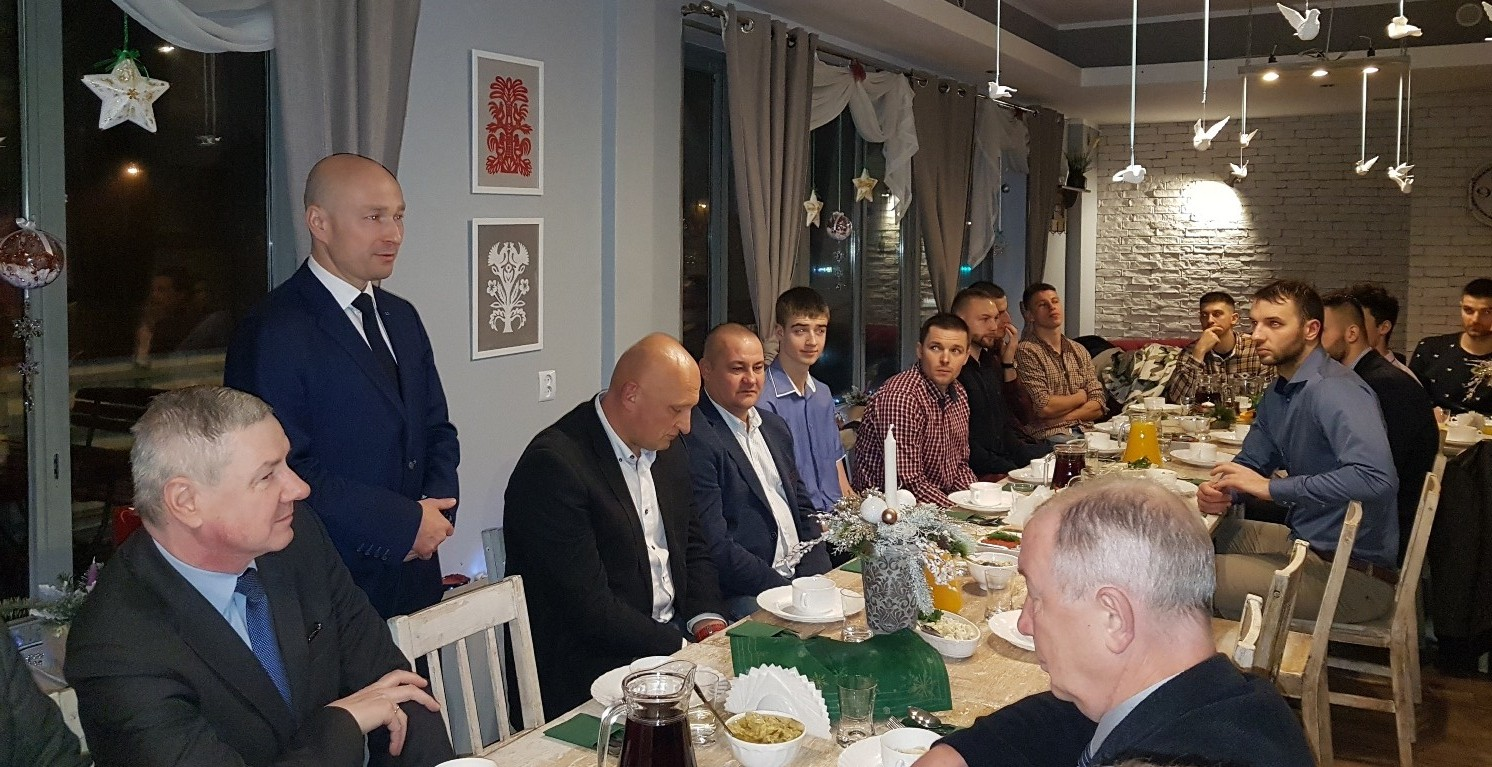 Stargard, 19.12.2017. Spotkanie wigilijne w Spójni.